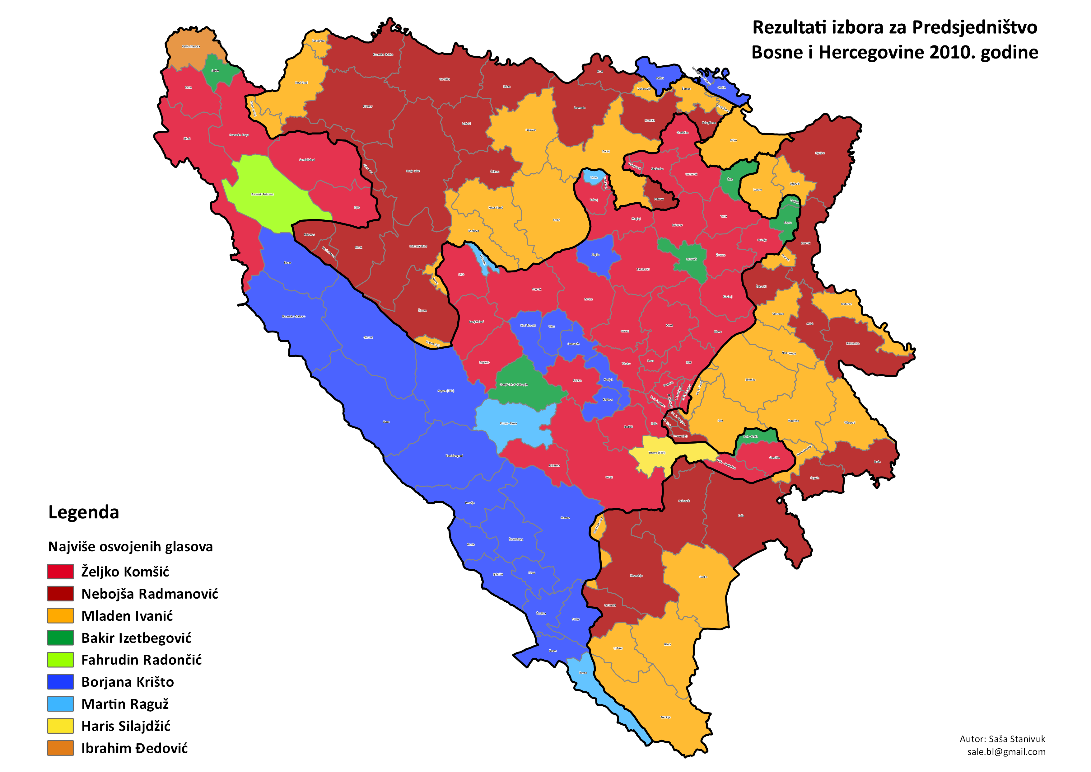 Srpskohrvatski / српскохрватски: Izbori za Predsjedništvo BiH 2010. godine